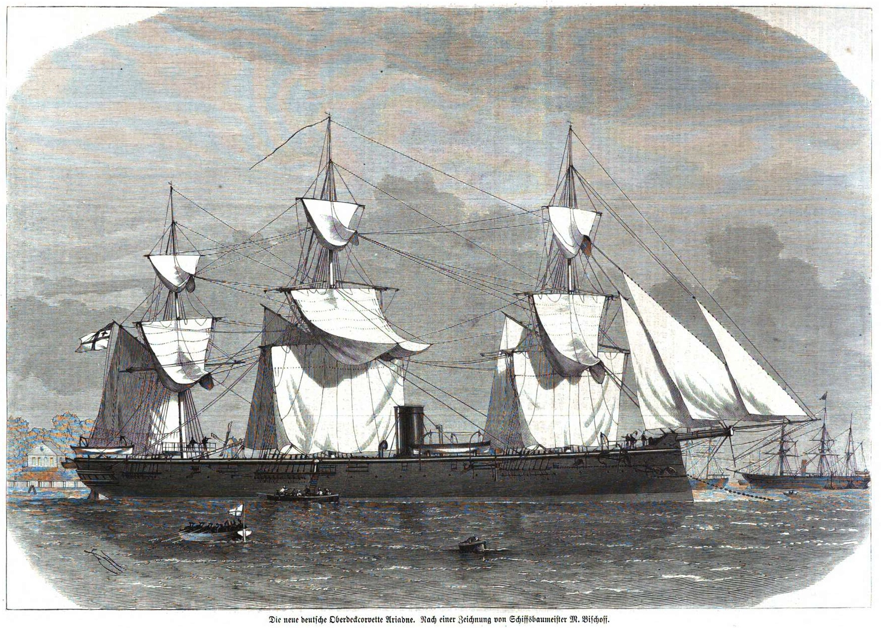 Korvette SMS Ariadne, 1871.